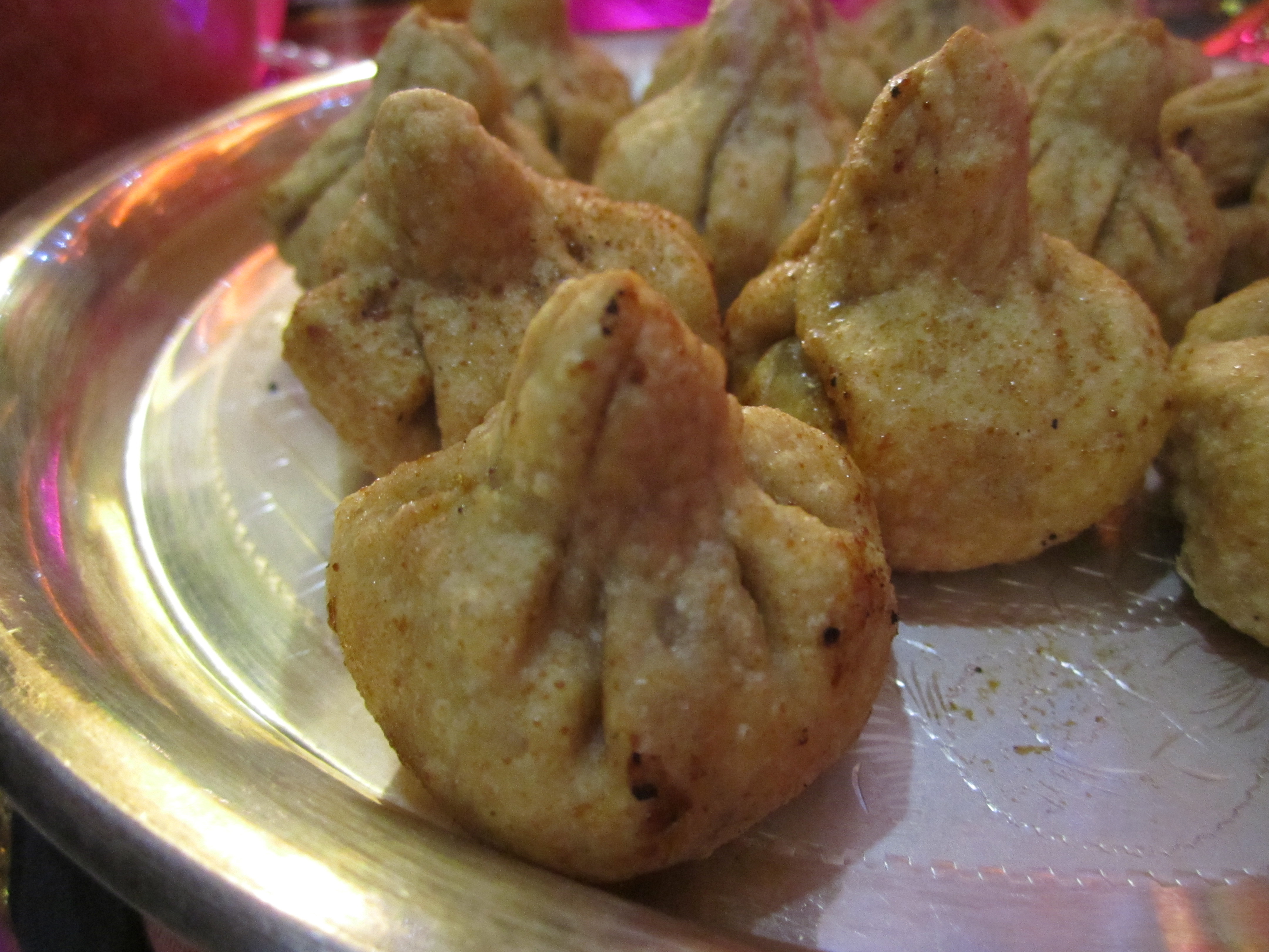 मोदक जवळून